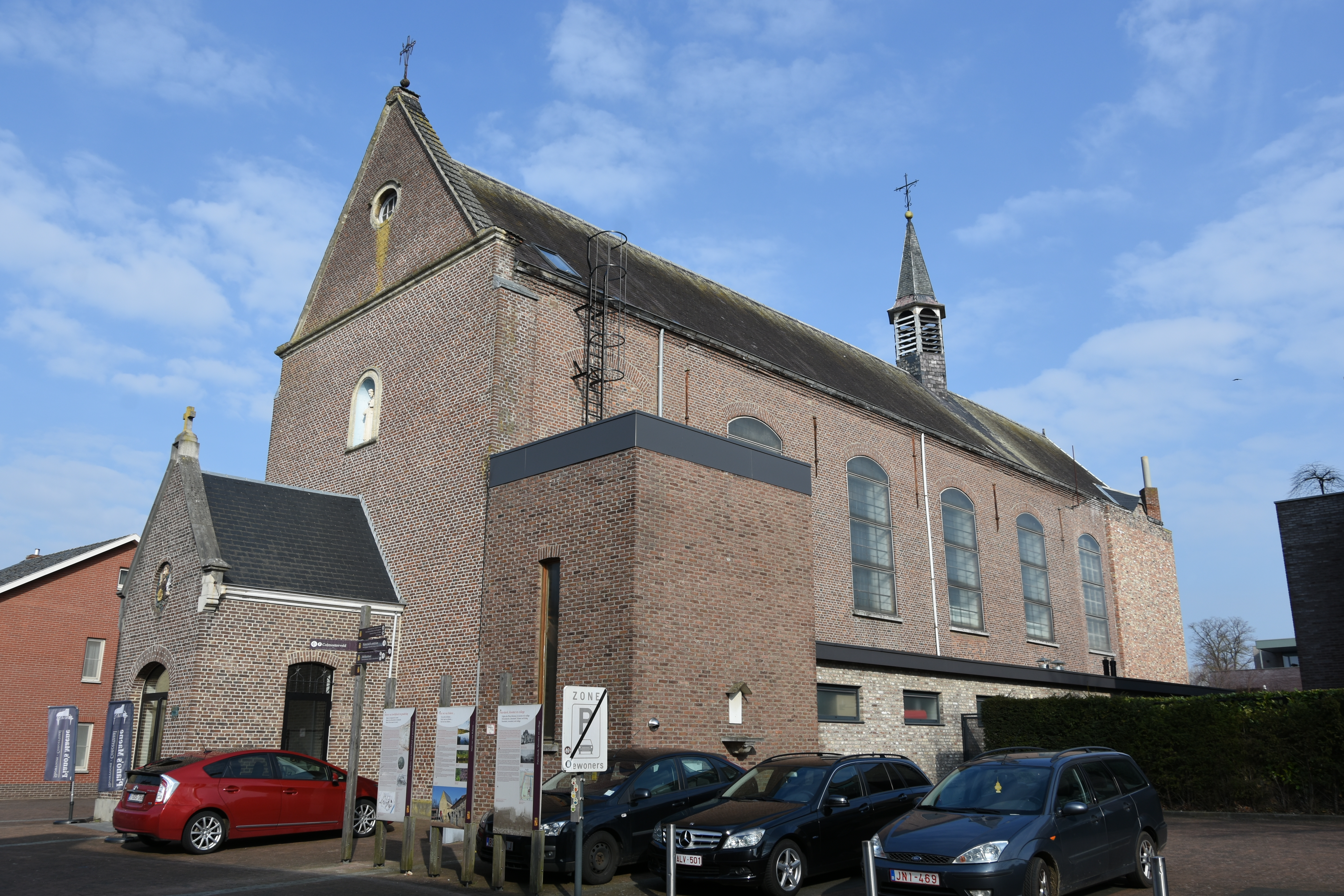 Paterskerk te Rekem, België